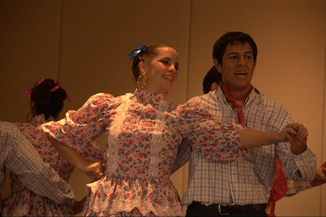 baile folklorico interpretado por la Compañia de Danza Folklórica de ITESM Campus Ciudad de Mexico en Campus Ciudad de México